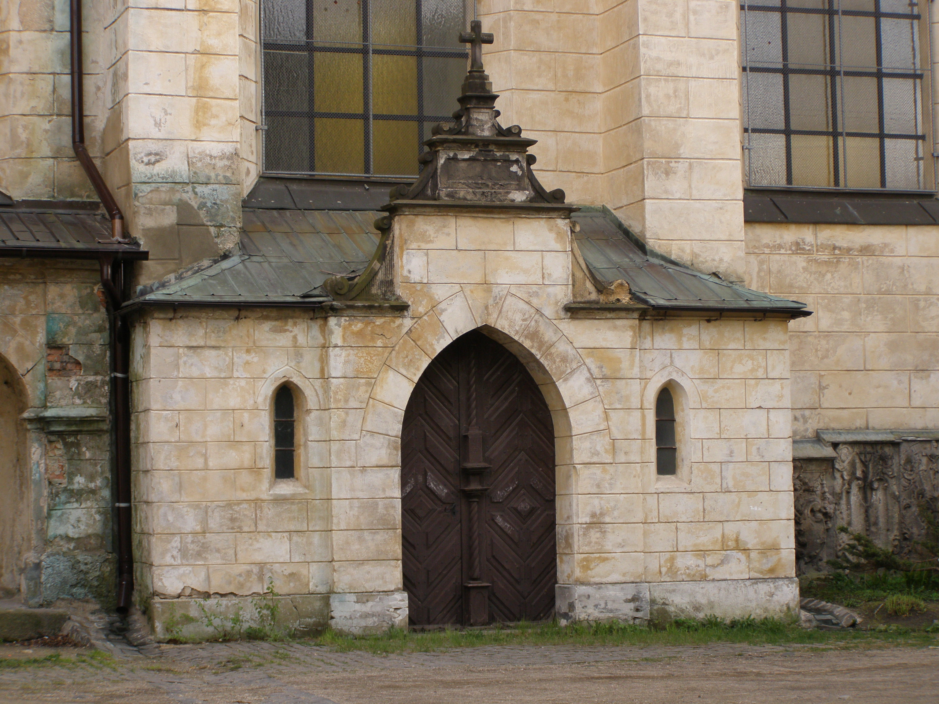 Česky: Frýdlant, kostel Nalezní svatého Kříže, vedlejší vchod)